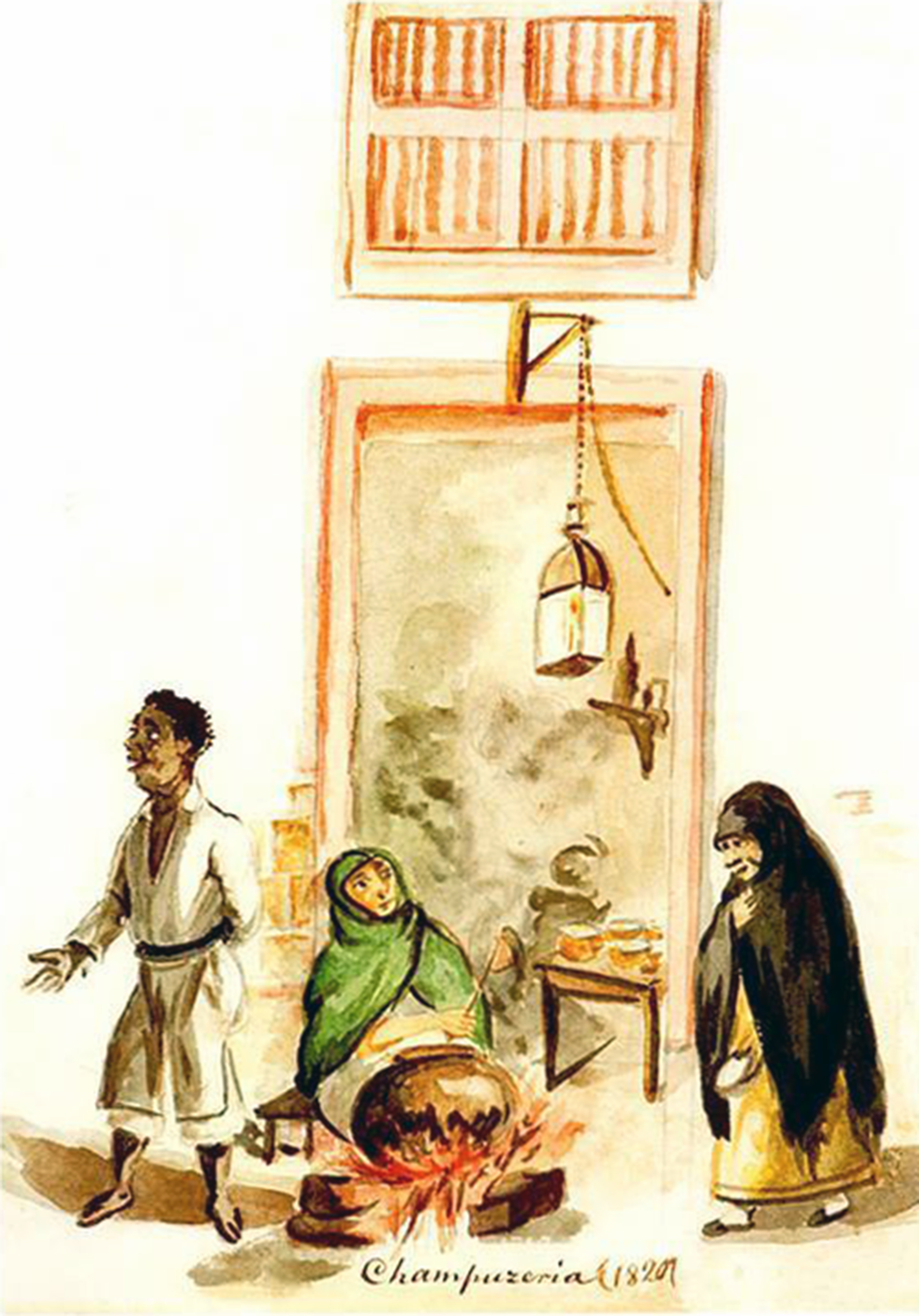 Acuarela de (Lima, 1807 - Lima, 1879)